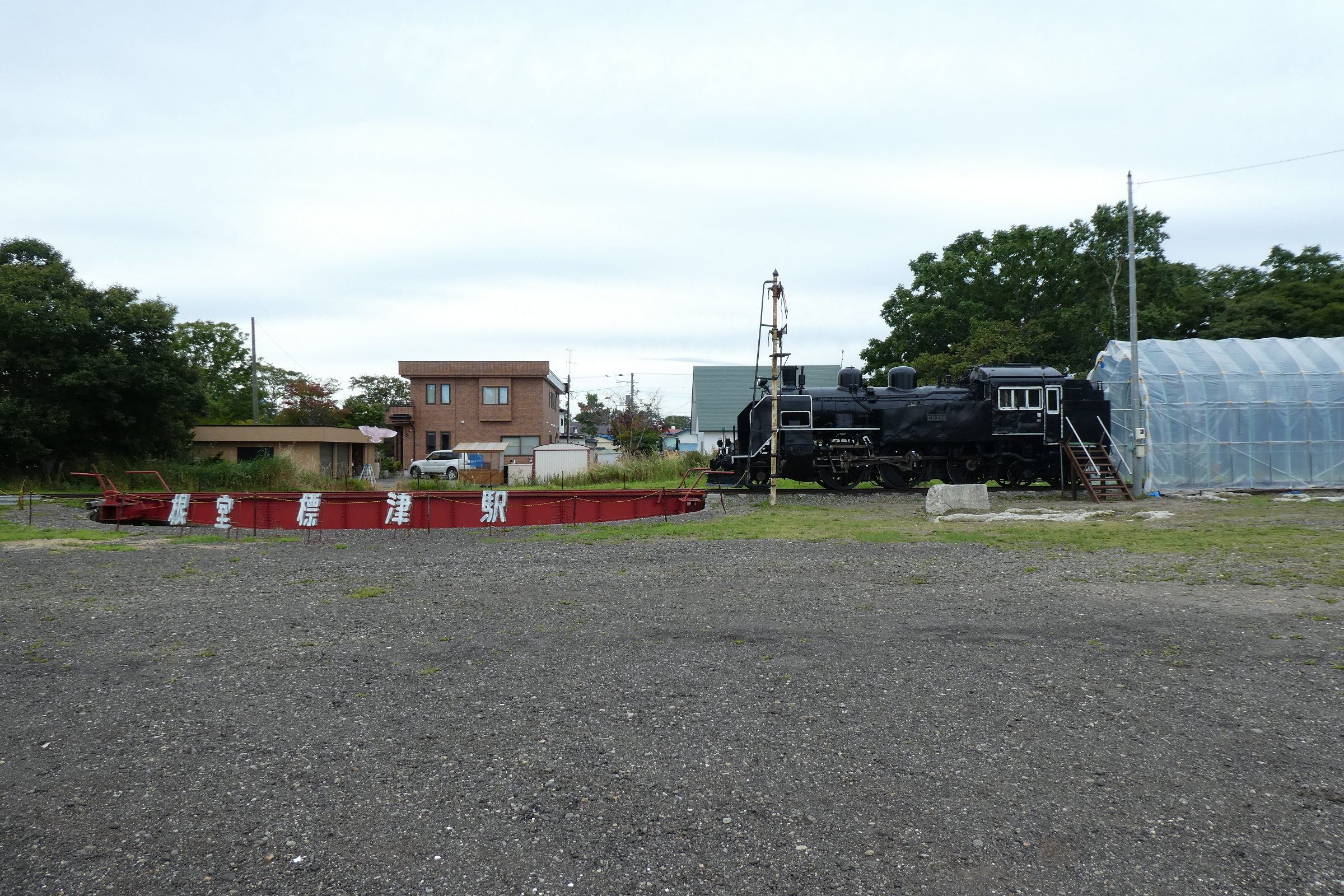 根室標津駅跡に保存されている転車台と、静態保存されてるC11型蒸気機関車224号機